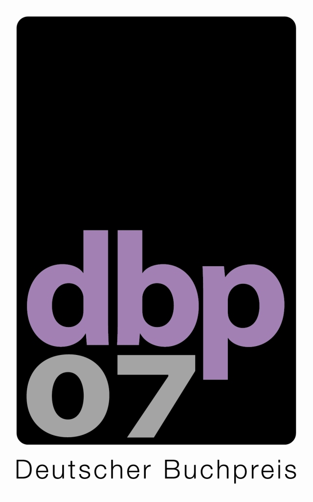 Logo Deutscher Buchpreis 2007